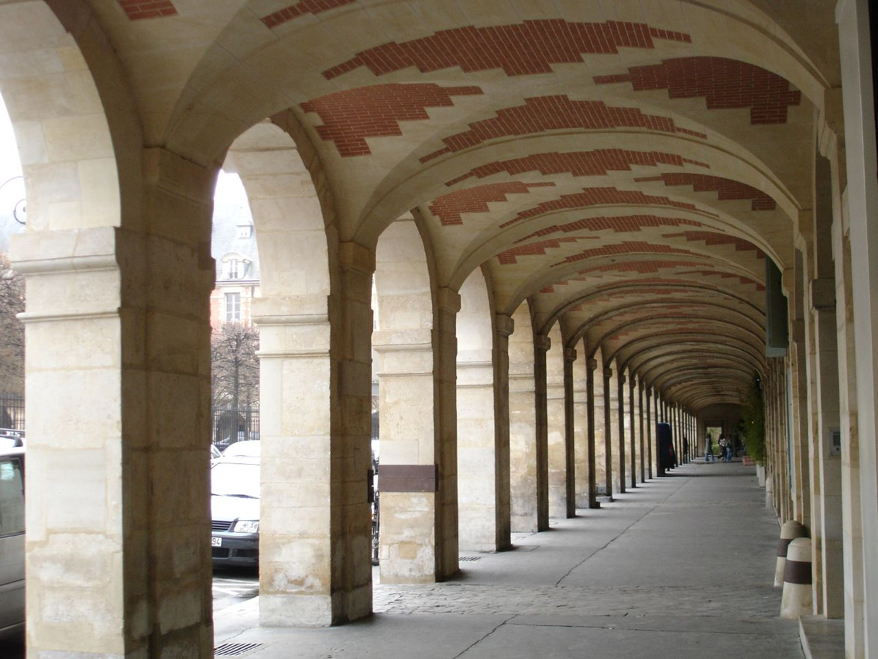 Archway, Place des Vosges (Marais), IVe arrondissement (4th quarter), Paris, France.Place Vosges 2